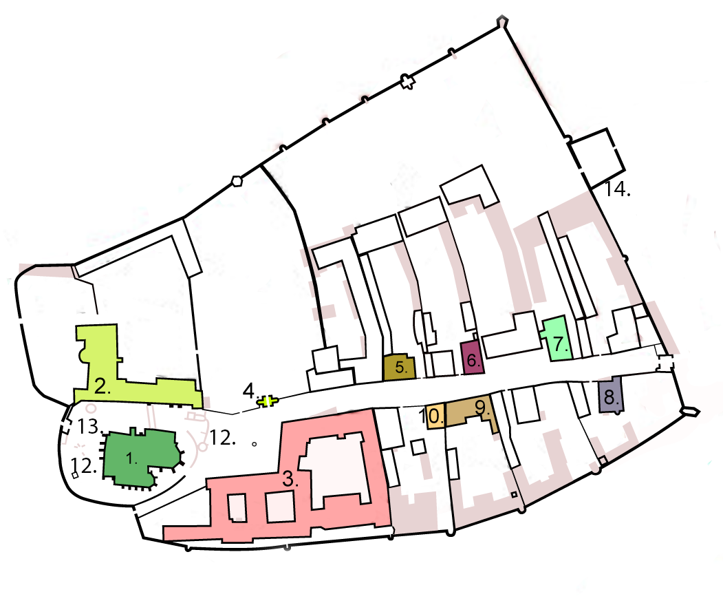 Komplex Spišskej Kapituly (In: Juraj Kucharík, Spiš, Pamiatková rezervácia Spišská Kapitula - Urbanisticko-historický výskum územia a zásady ochrany obnovy a prezentácie hodnôt pamiatkového územia, Pamiatkový úrad Slovenskej republiky) 1. Katedrála sv. Martina, 2. Biskupský palác, 3. Kňazský seminár, 4. Hodinová veža, Kanónia č. 5,Kanónia č. 6, Kanónia č. 7, Kanónia č. 8, Kanónia č. 9, Kanónia č. 10, č. 12. Nálezy georadarom, č. 13 Kaplnka sv. Ondreja a č. 14 Opevnenie. Sive časti bez číslovania sú stavby ktoré sa dodnes nezachovali.